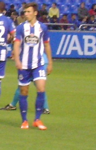 Saúl, jugador del Deportivo